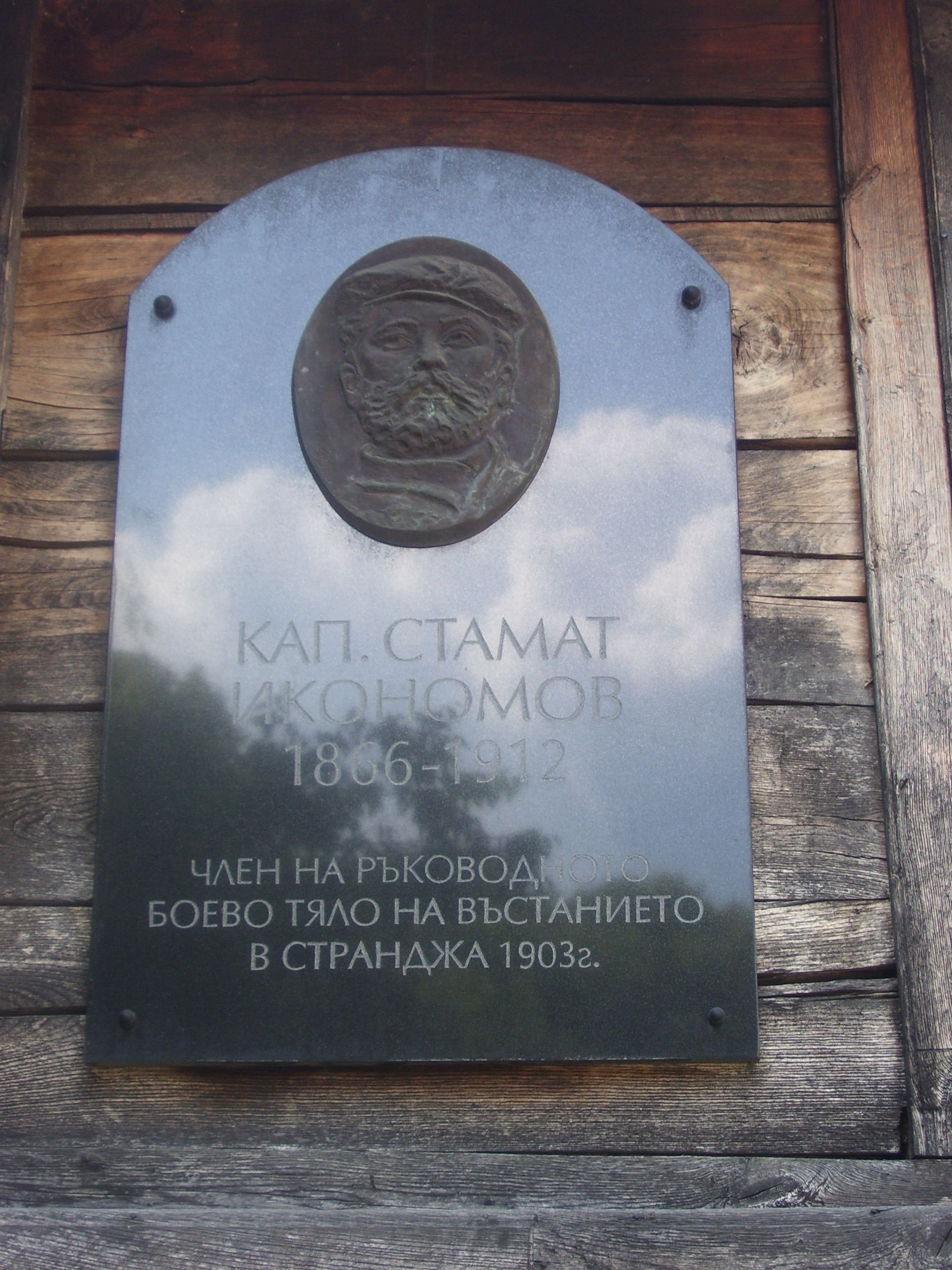 Къщата на капитан Стамат Икономов в Малко Търново.